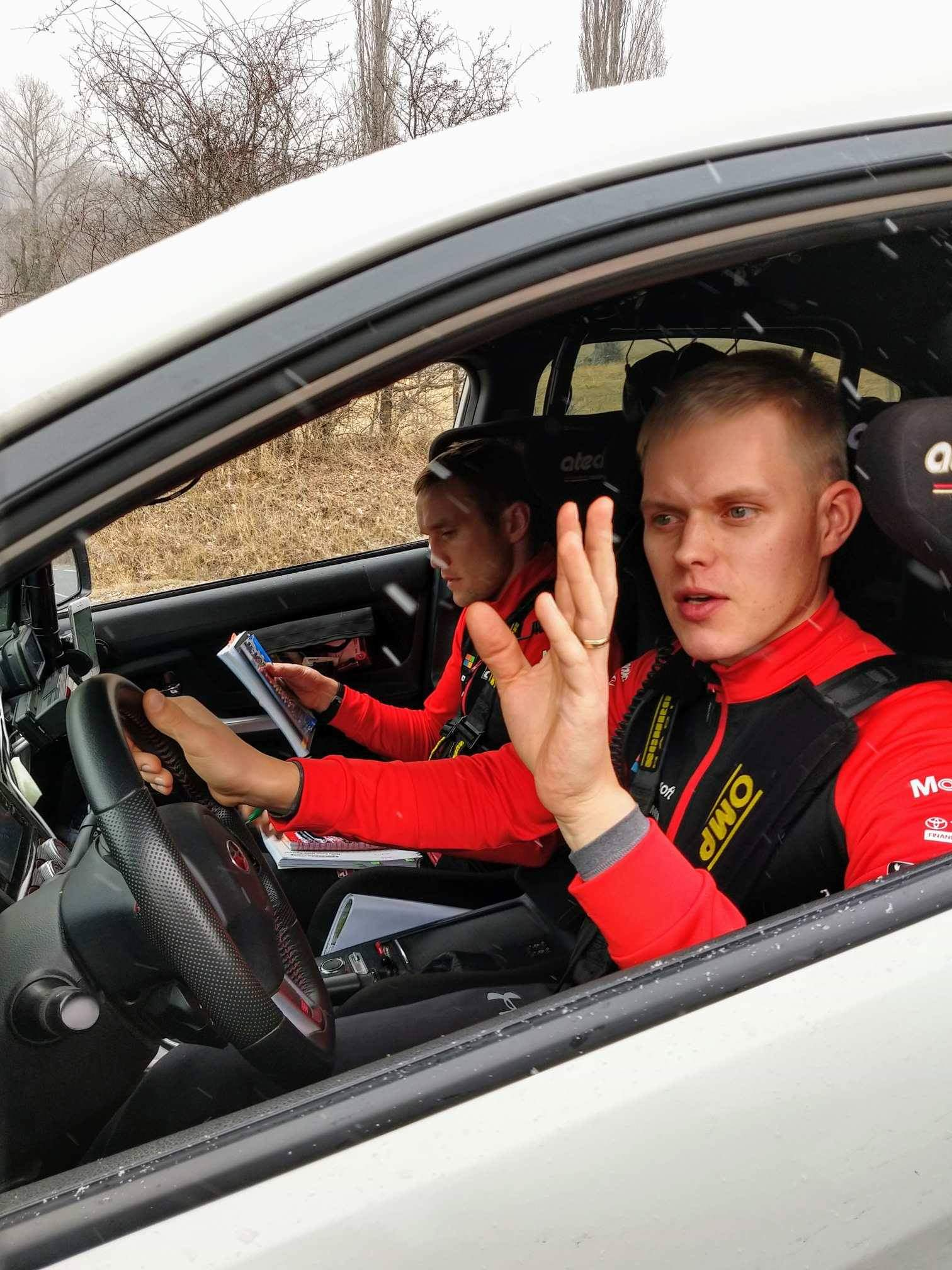 Ott Tänak durant les reconnaissances du Rallye Monte-Carlo 2019.